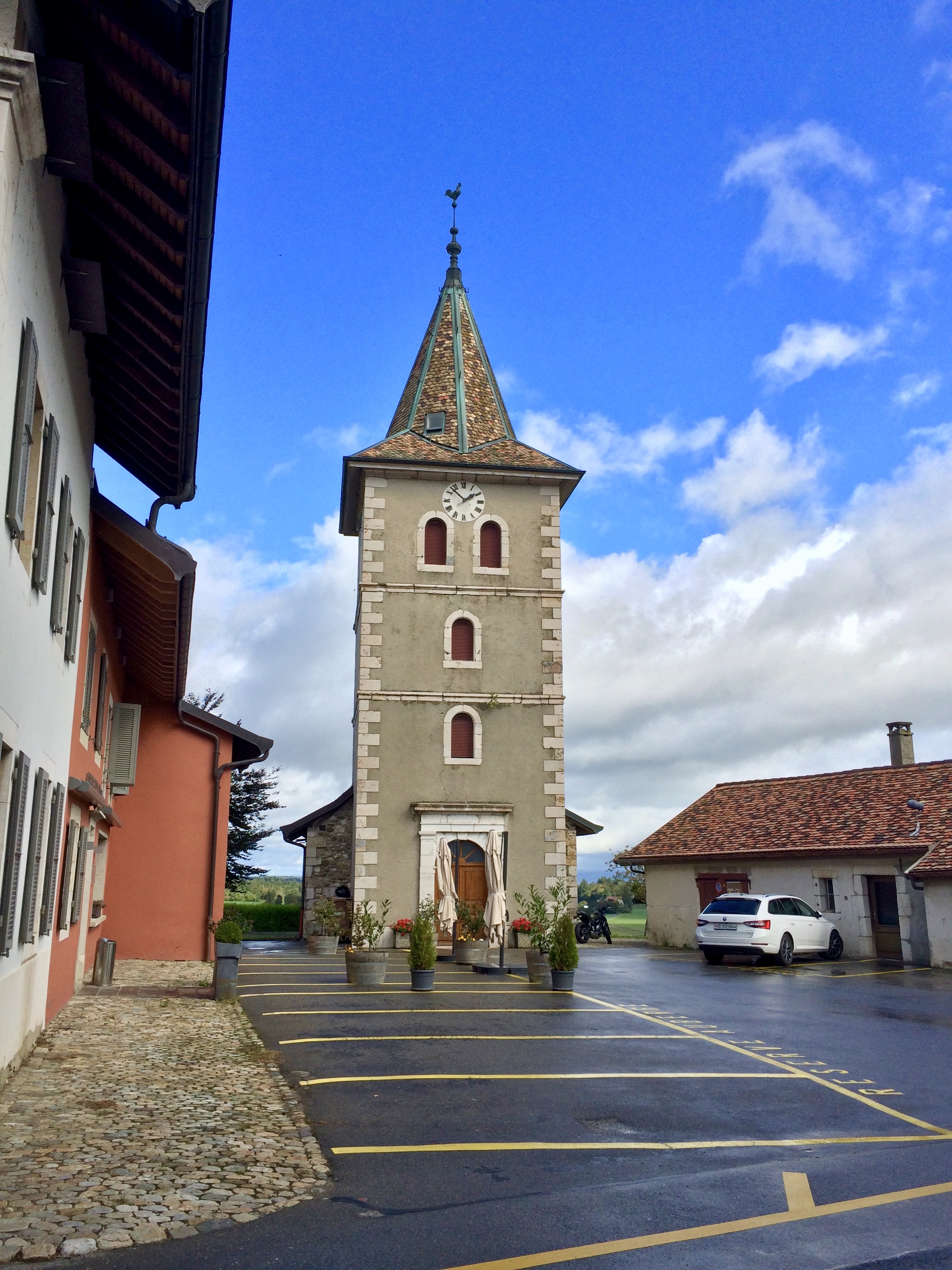 Le temple d'Essertines-sur-Rolle (VD), Suisse.